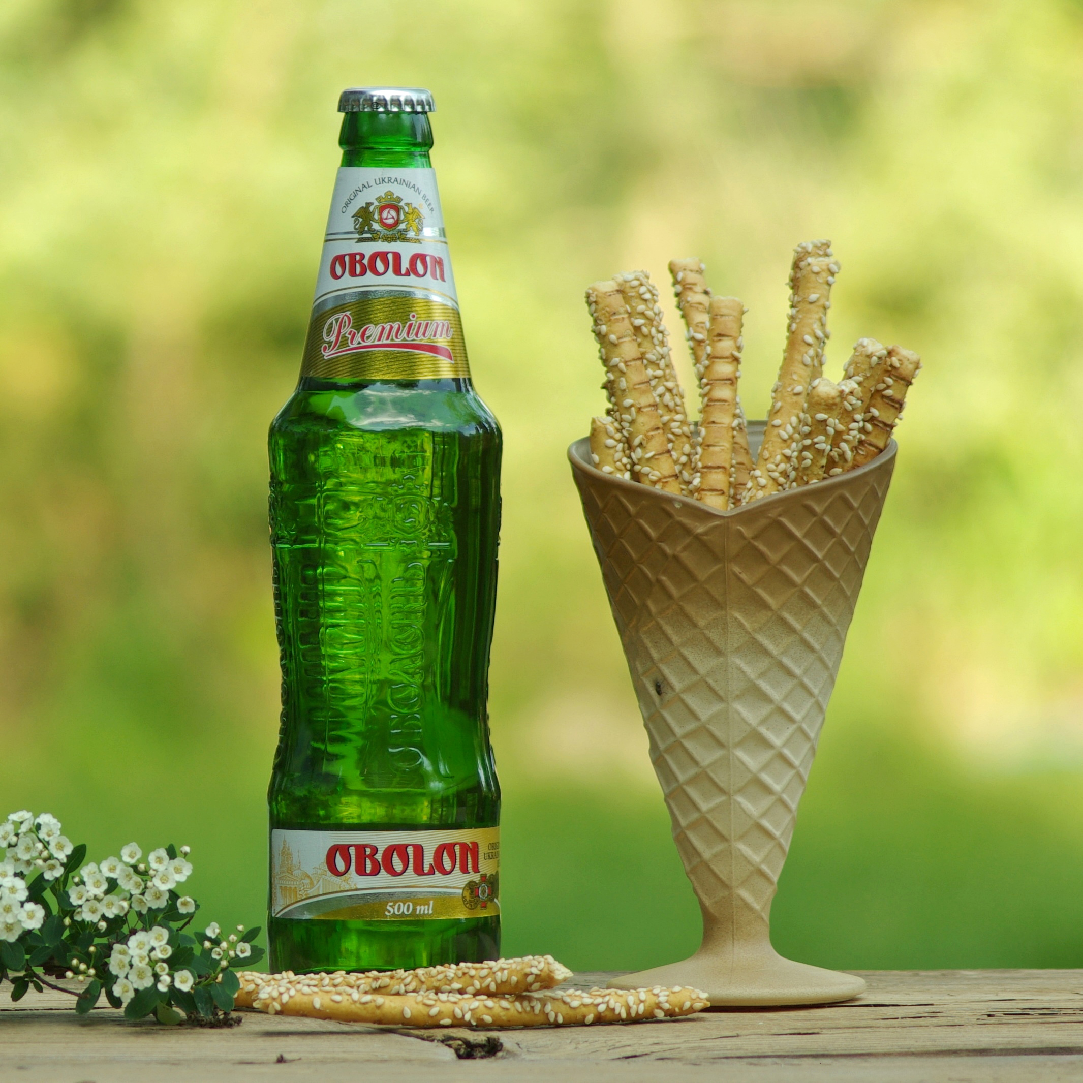 Darmowe zdjęcia Free Photos